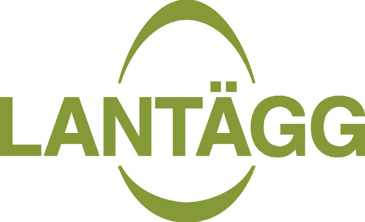 DAVA Foods Sverige logo. DAVA Foods A/S er en dansk fremstillings- distributions- og pakkerivirksomhed. Virksomheden pakker og distribuerer skalæg, desuden produceres pasteuriserede og kogte æggeprodukter. DAVA Foods har sit hovedsæde i Hadsund. Tilladelse givet til brug på Wikipedia af Mette Due Andersen Projektchef i DAVA Foods. Scandinavian Design Lab, har designede logoet tilbage i 2006.